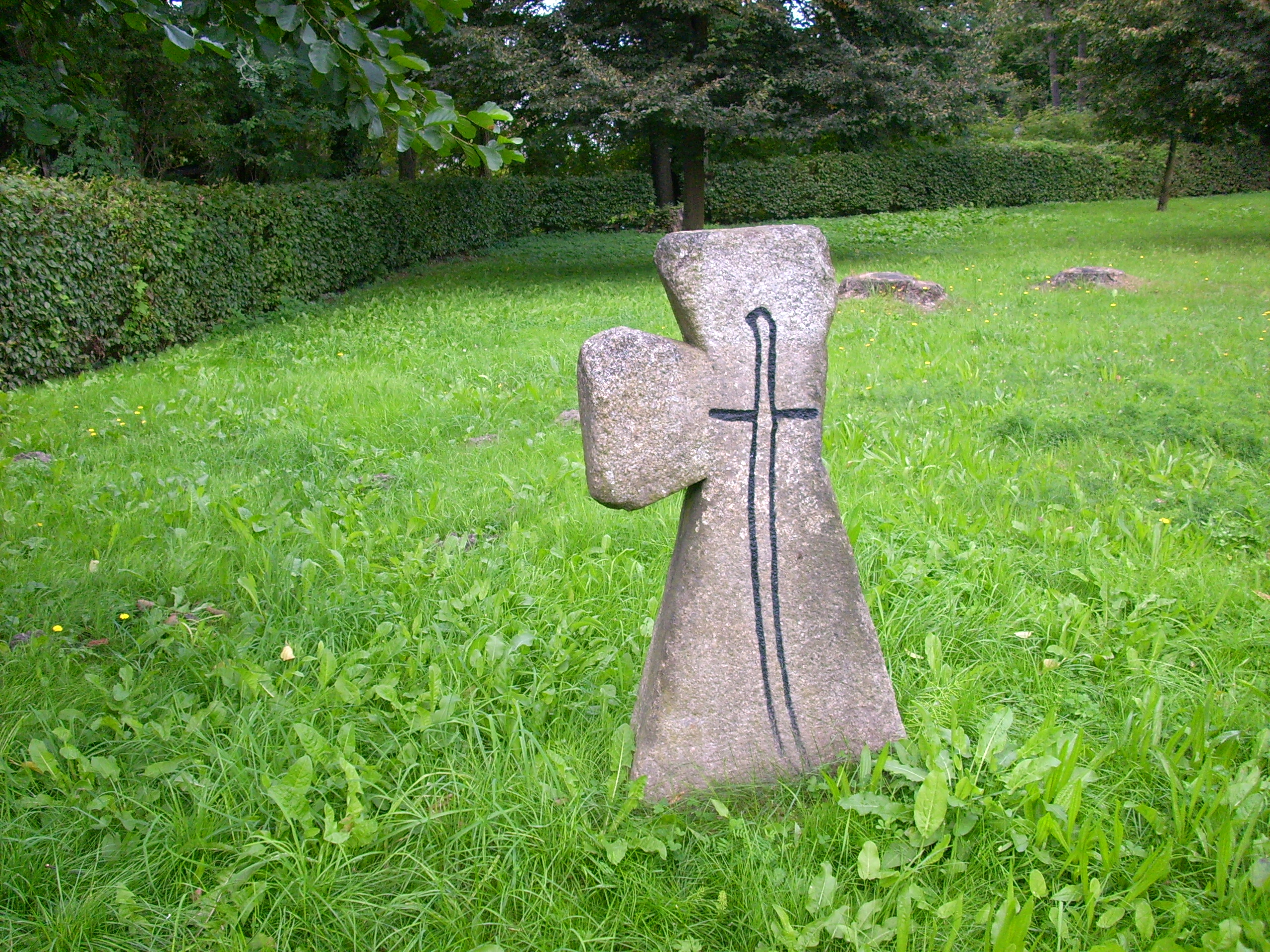 Steinkreuz in Wartha (Ortsteil von Königswartha) Hornjoserbsce: Kamjentny křiž w Stróži, gmejna Rakecy